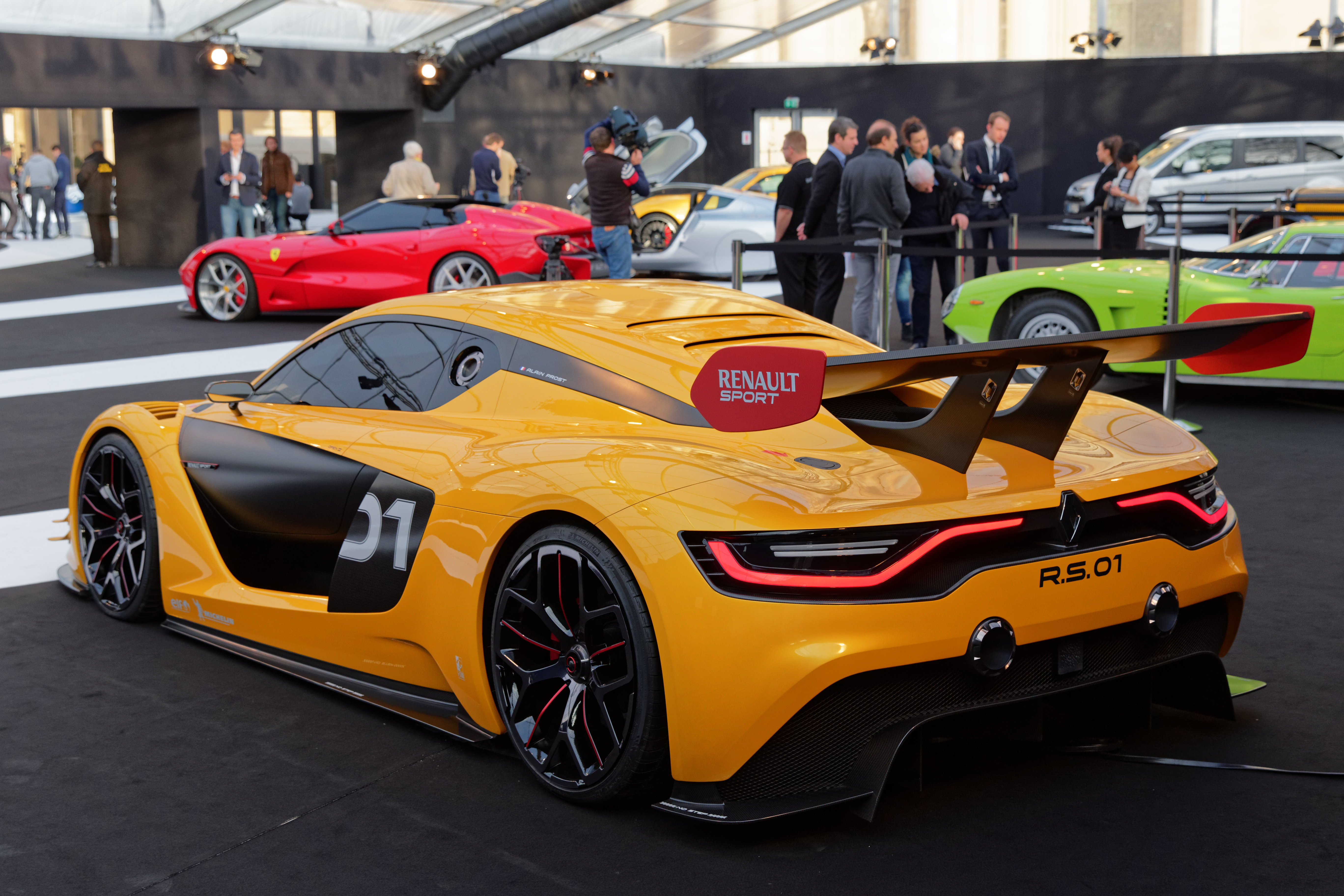 La Renault RS1 exposée lors du festival automobile international 2015.